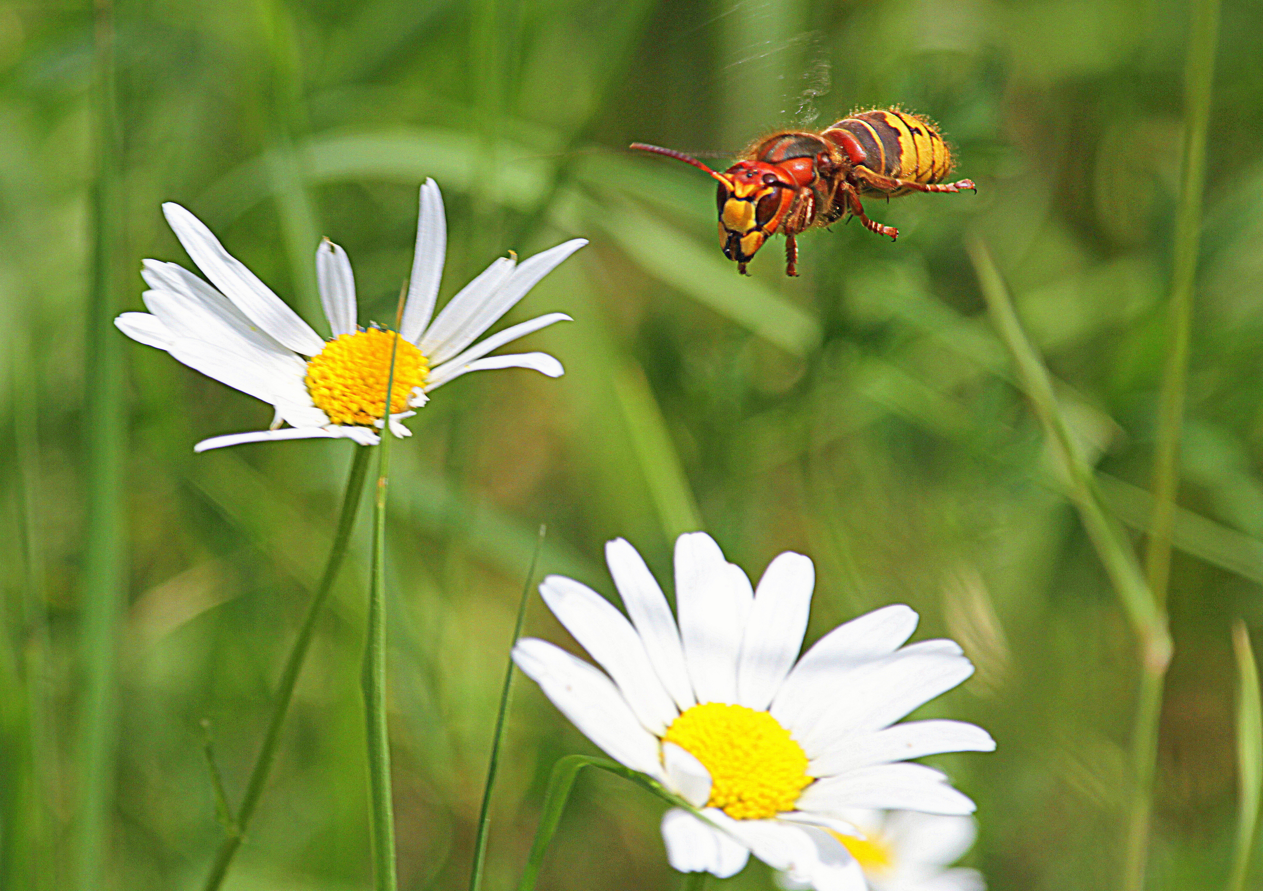 Europäische Hornisse, Königin - Vespa Crabro